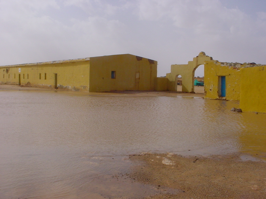 Efectos de las lluvias de febrero de 2006 en el campamento 27 de Febrero.